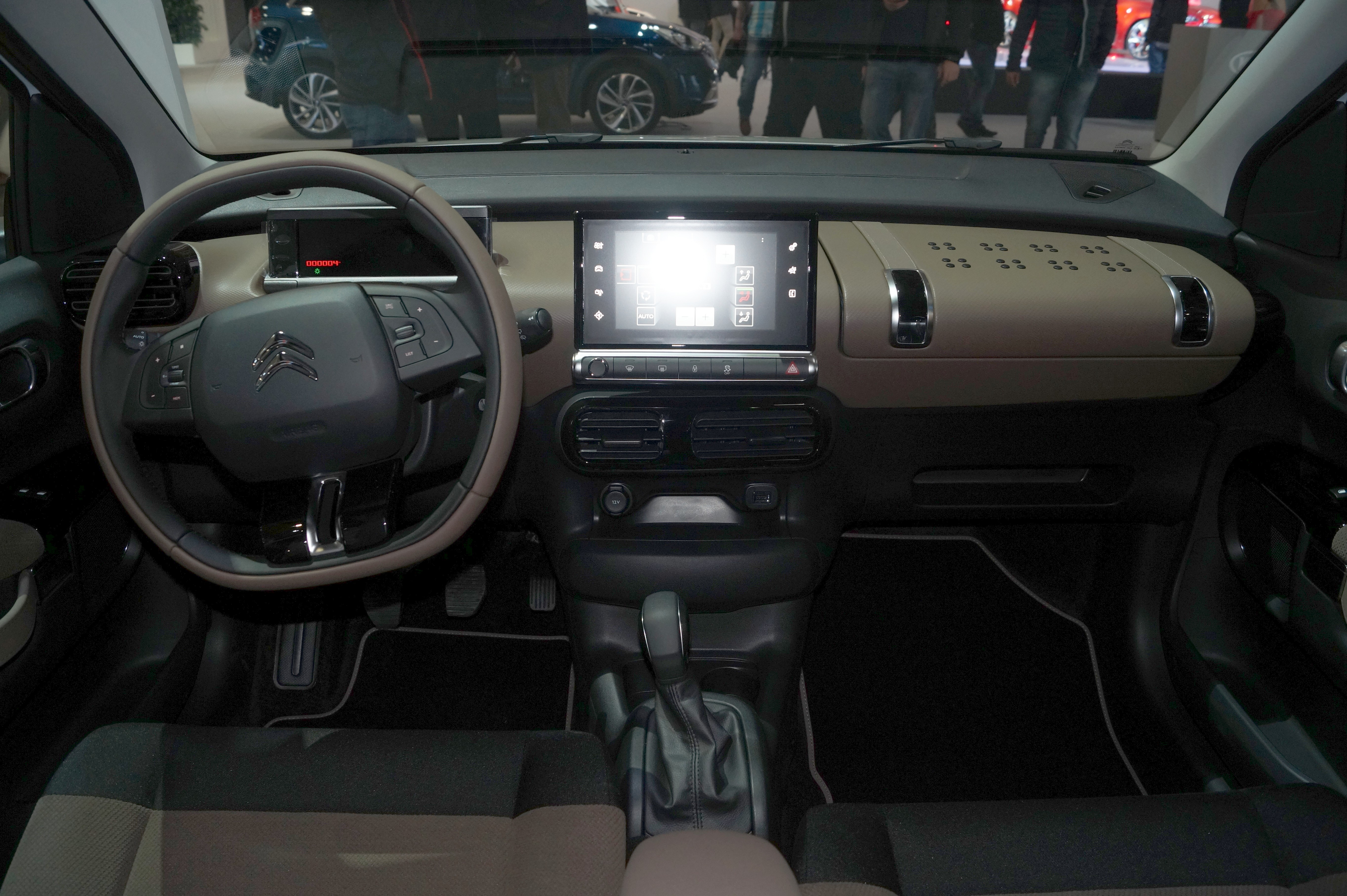 Wnętrze Citroëna C4 Cactus na Motor Show Poznań 2017.